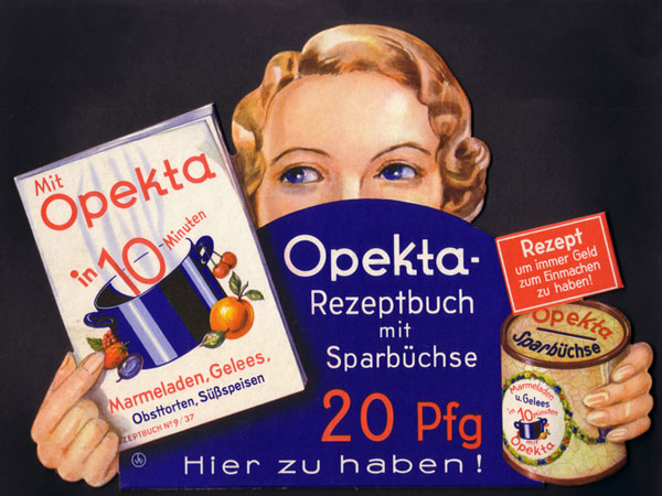 Ein Werbe-Pappaufsteller für das Opekta-Rezeptbuch, gratis dazu eine Sparbüchse, ebenfalls aus Pappe